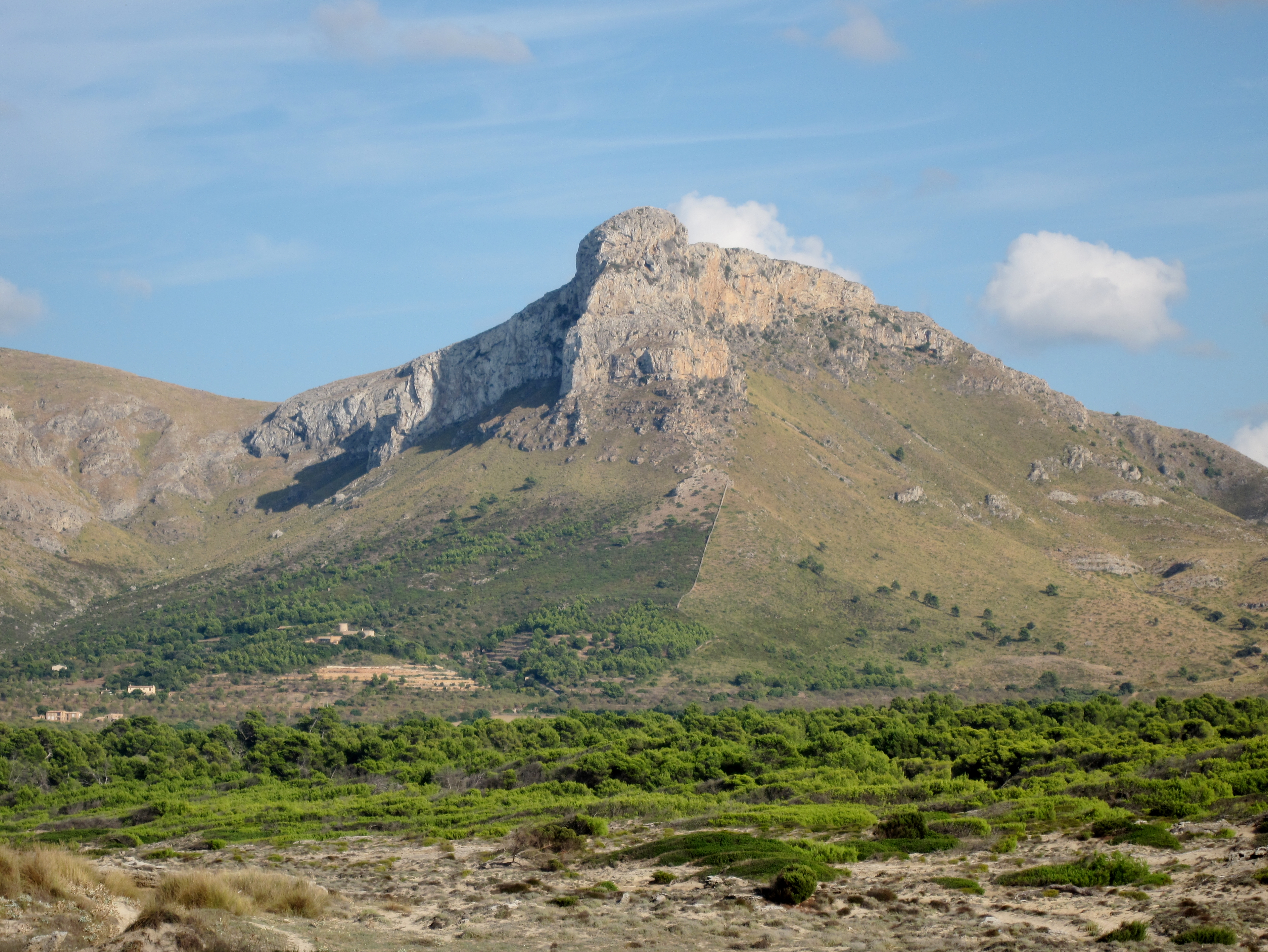 Puig de Ferrutx, Gemeinde Artà, Mallorca, Spanien